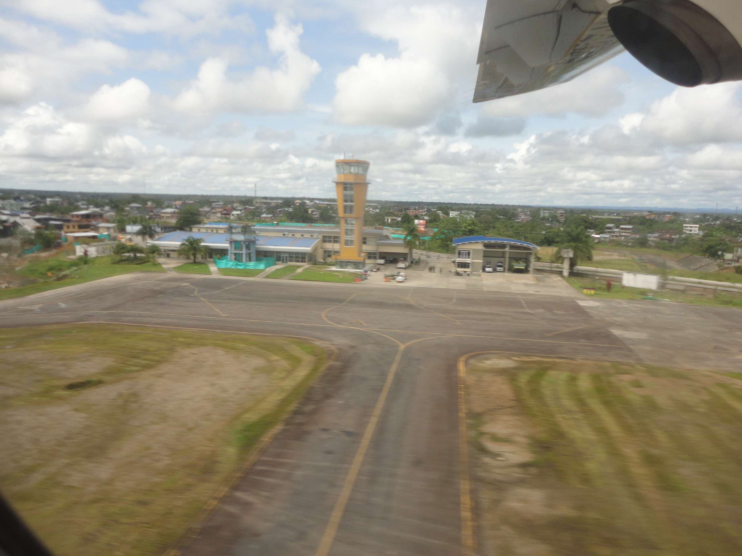 Aeropuerto el Caraño